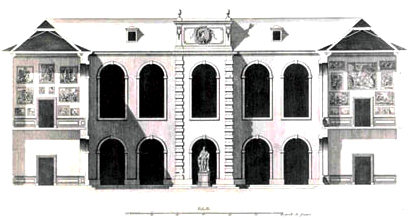 Aufriss und Schnitt des Galeriegebäudes, Stadtschloss Düsseldorf